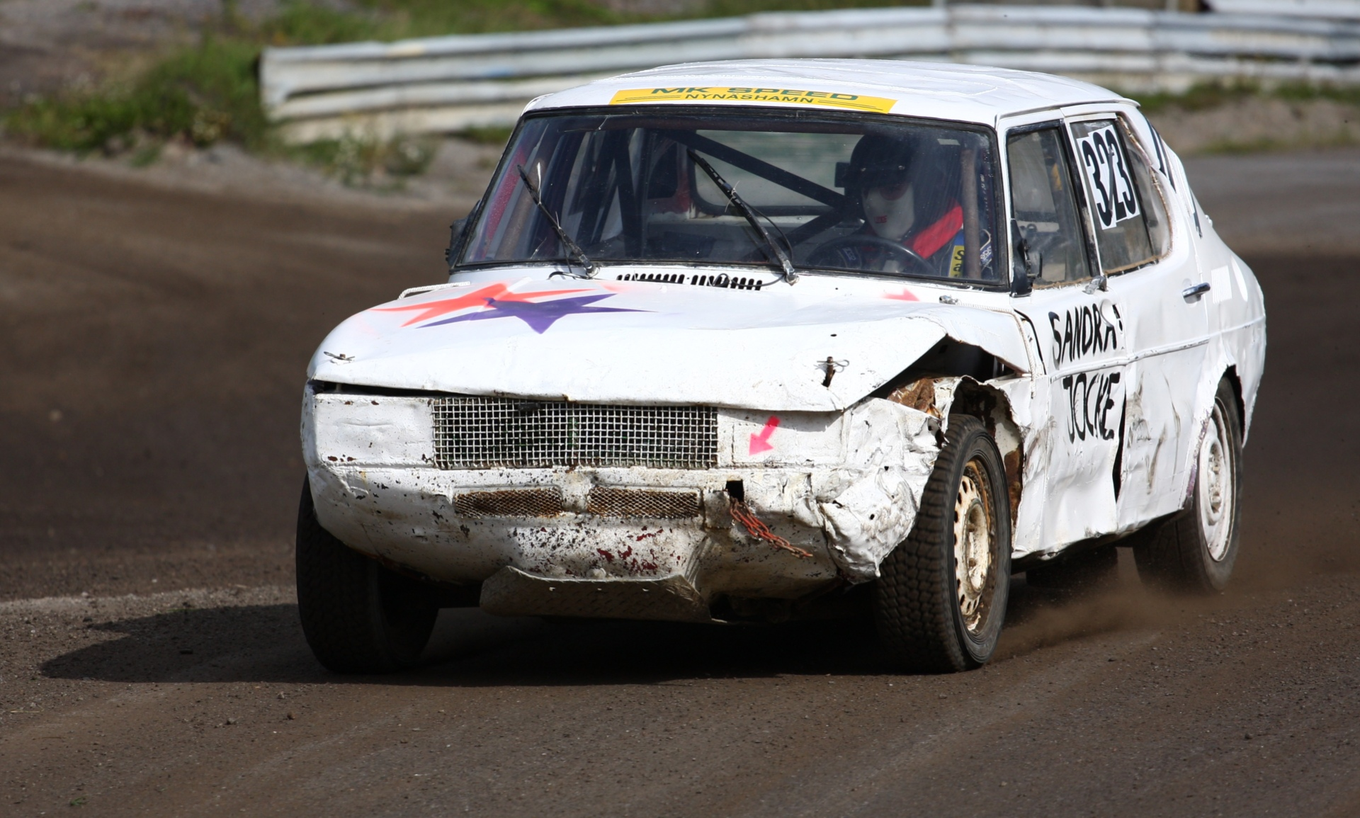 Folkrace saab